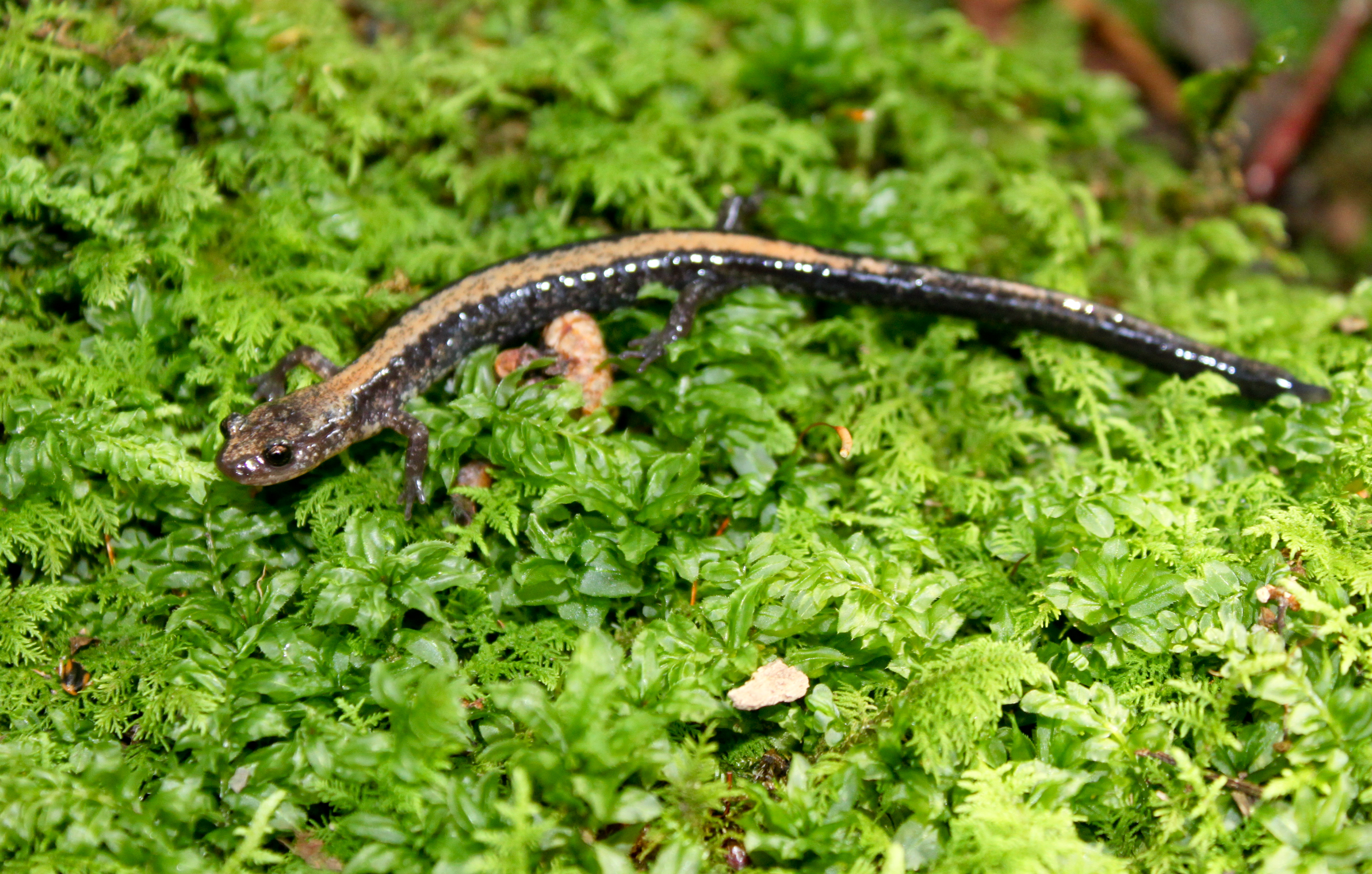 Shenandoah Salamander